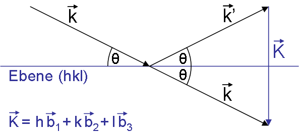 Zur Äquivalenz von Laue- und Bragg-Bedingung: k wird an Ebene hkl spiegelnd reflektiert zu k'. Auf der Ebene steht der reziproke Gittervektor K senkrecht. K ist auch der Differenzvektor aus k-k'.